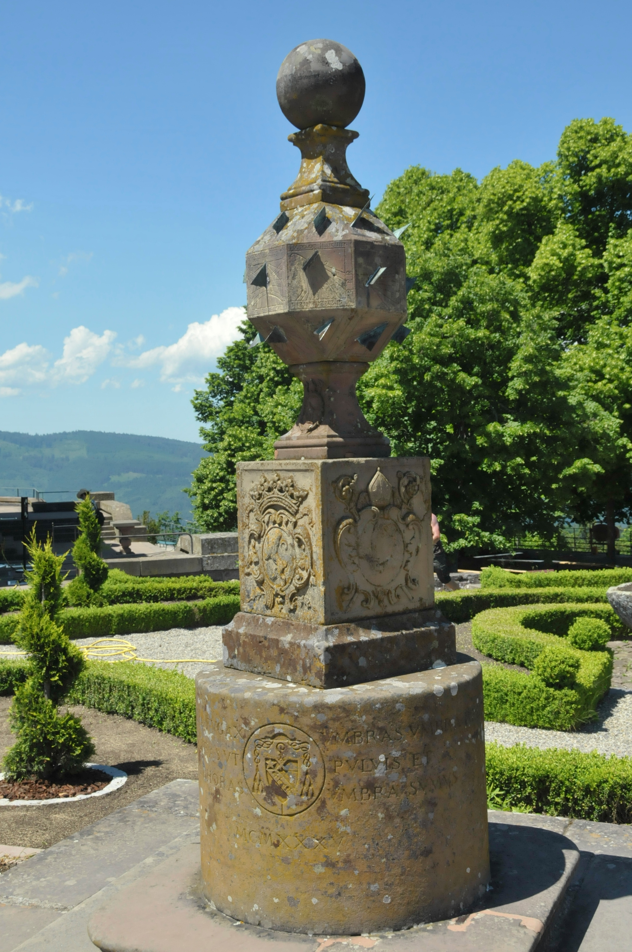 Mont Sainte-Odile, Sonnenuhr